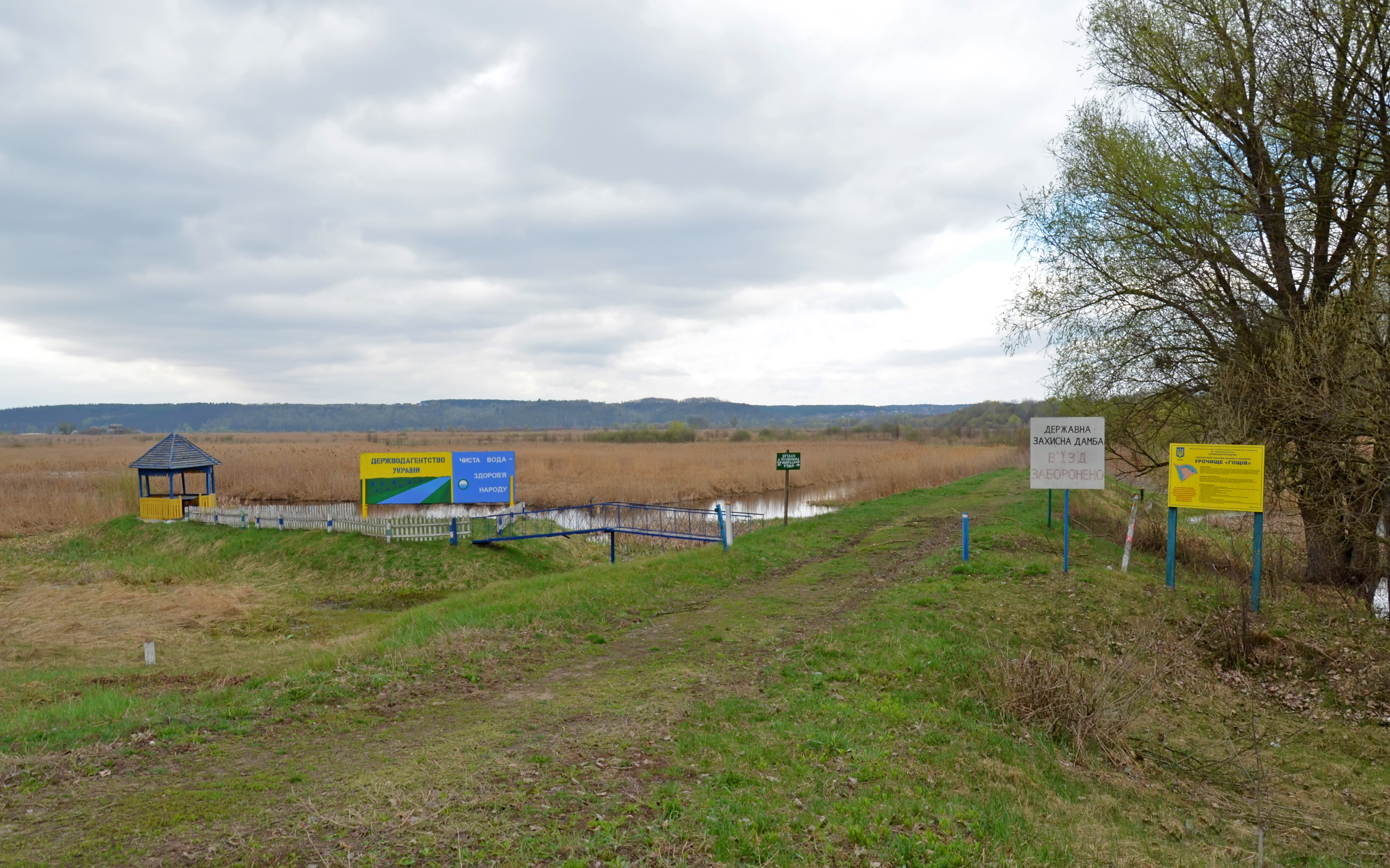 Урочище «Гощів», Обухівський район, Нещерівська та Старобезрадичівська сільські ради